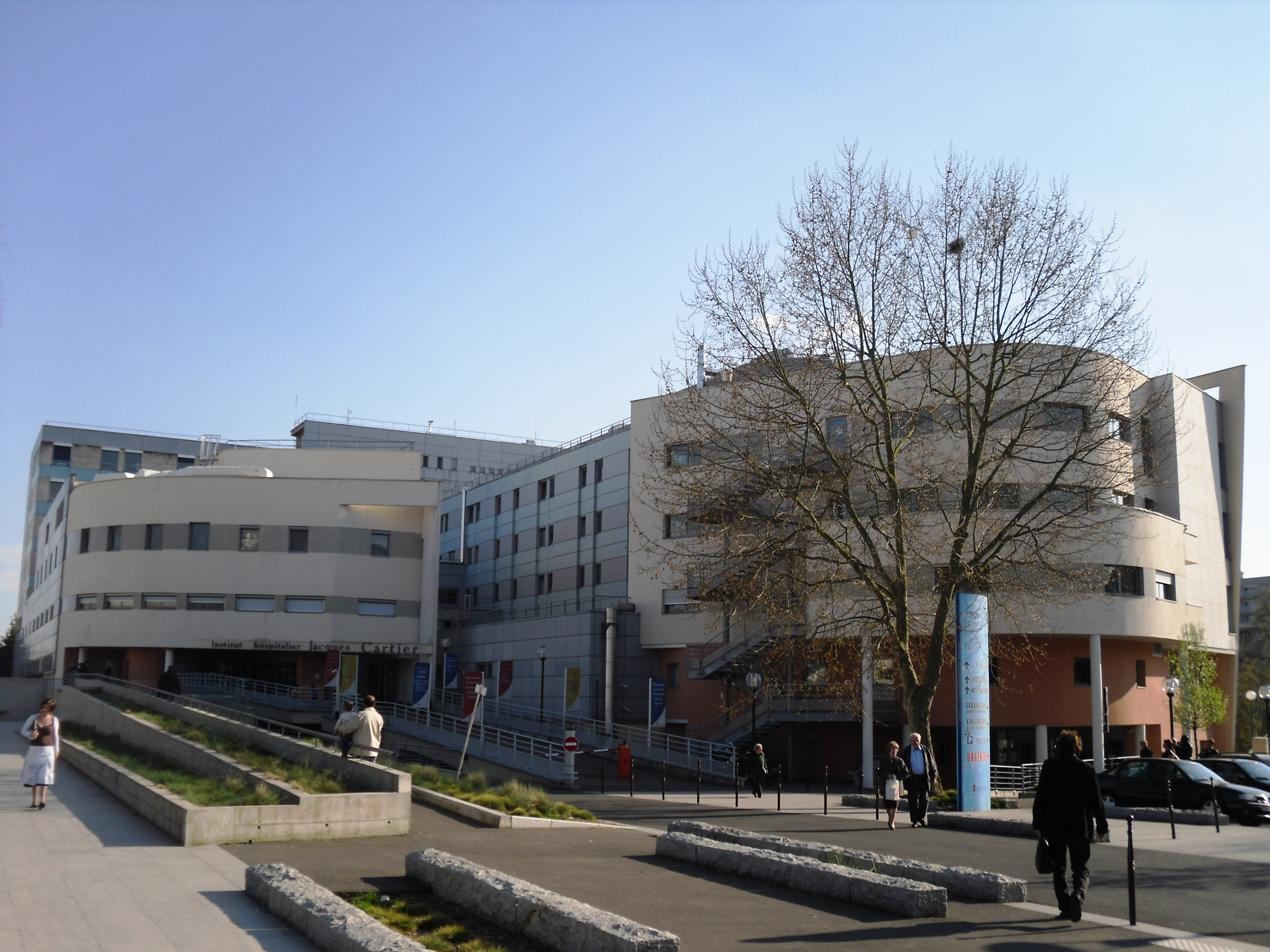 L'Institut hospitalier Jacques Cartier à Massy (91)